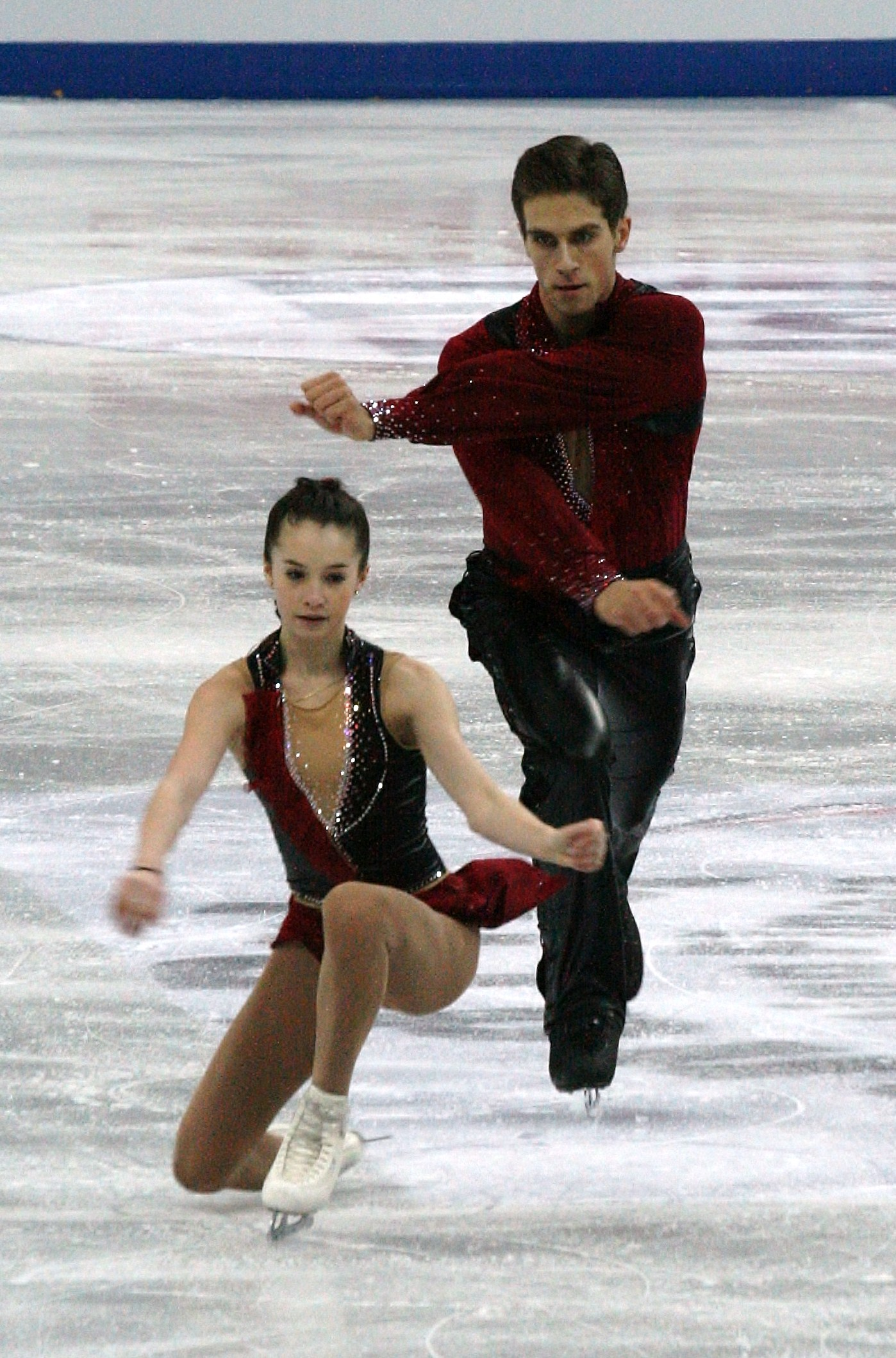 Василиса Даванкова и Андрей Депутат (Россия) на финале Гран-при среди юниоров 2012-2013. Произвольная программа.